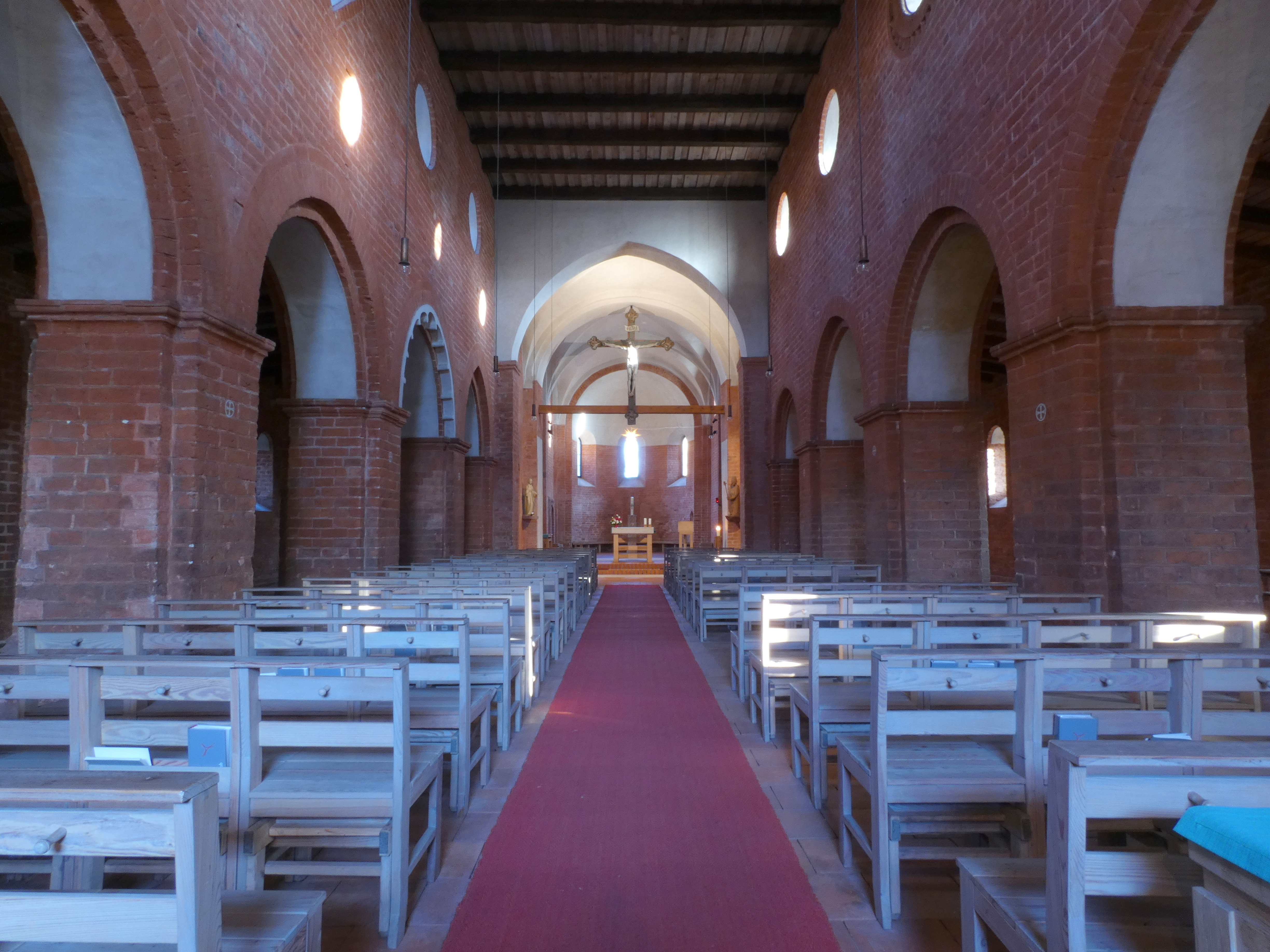 Innensicht St. Nikolai Brb